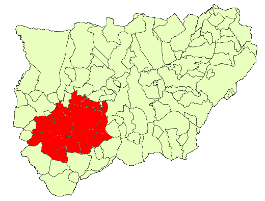 Localizacion del Área metropolitana de Jaén sobre el mapa provincial